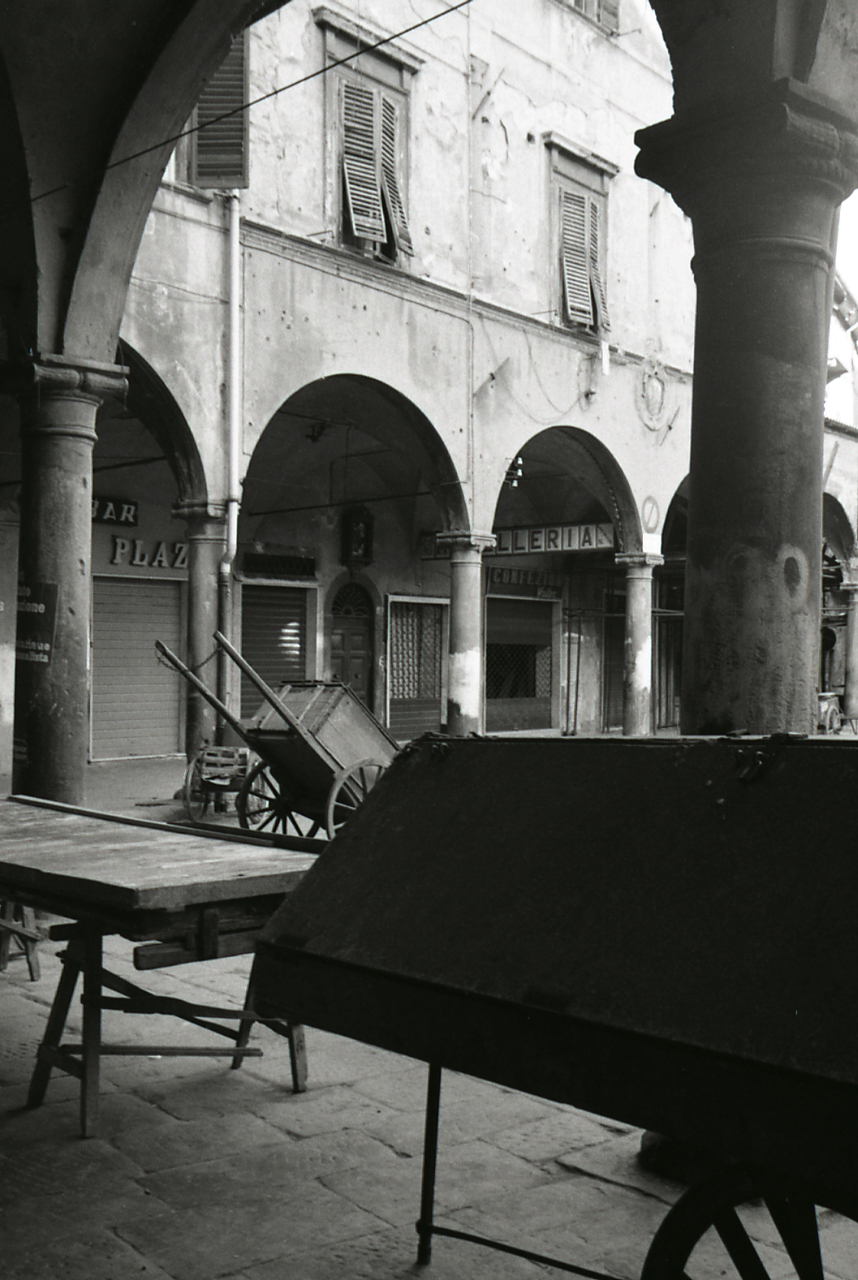 Pisa. Centro storico: vedute urbane lungo il fiume Arno. Mercato. Piazza dei Cavalieri con Palazzo della Carovana, sede dellaScuola Normale Superiore. Servizio fotografico : Pisa, 1973 / Paolo Monti. - Strisce: 7, Fotogrammi complessivi: 37 : Negativo b/n, gelatina bromuro d'argento/ pellicola ; 35 mm. - ((Sul portanegativi: N[I]K[MA]T FP4. - Occasione: Documentazione per la pubblicazione: Università di Pisa, "I contenuti formativi della città ambientale: ricerca sui problemi di insediamento dell'Università di Pisa", Pisa, Pacini, 1974. - Fonte: Agenda di Paolo Monti: Leica 1501-3000 Controllo numerazione (1950-1978), presso Archivio Paolo Monti. - Fonte: Monografia di Università di Pisa: I contenuti formativi della città ambientale: ricerca sui problemi di insediamento dell'Università di Pisa, Pisa, Pacini (1974). - Fonte: Fattura di Paolo Monti: IV. Commesse/ Fattura n. 10 (1974/05/16), presso Archivio Paolo Monti